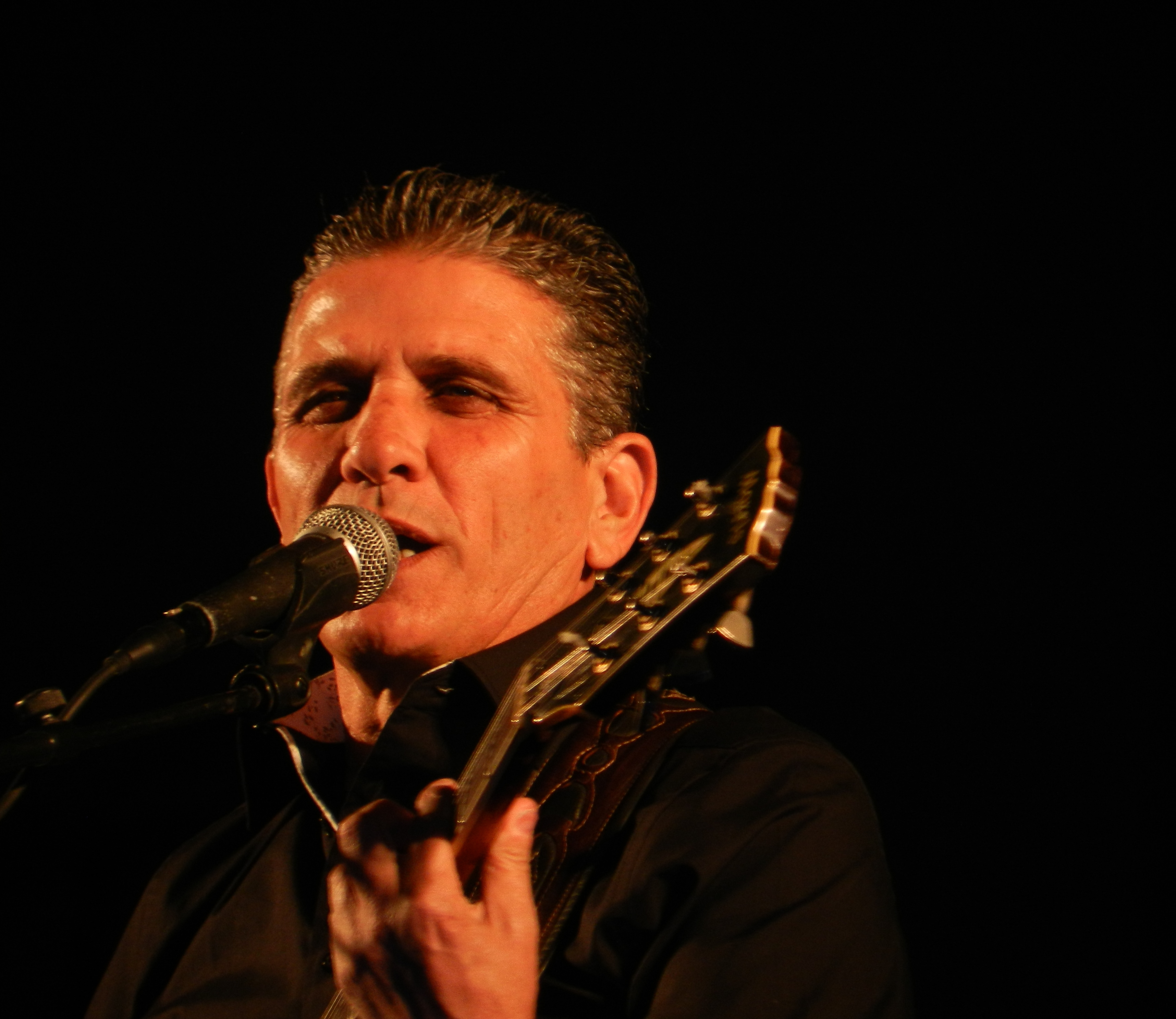 חיים אוליאל הוא זמר ומוזיקאי ישראלי, מתוך הופעה במימונה 2013 – רחובות.